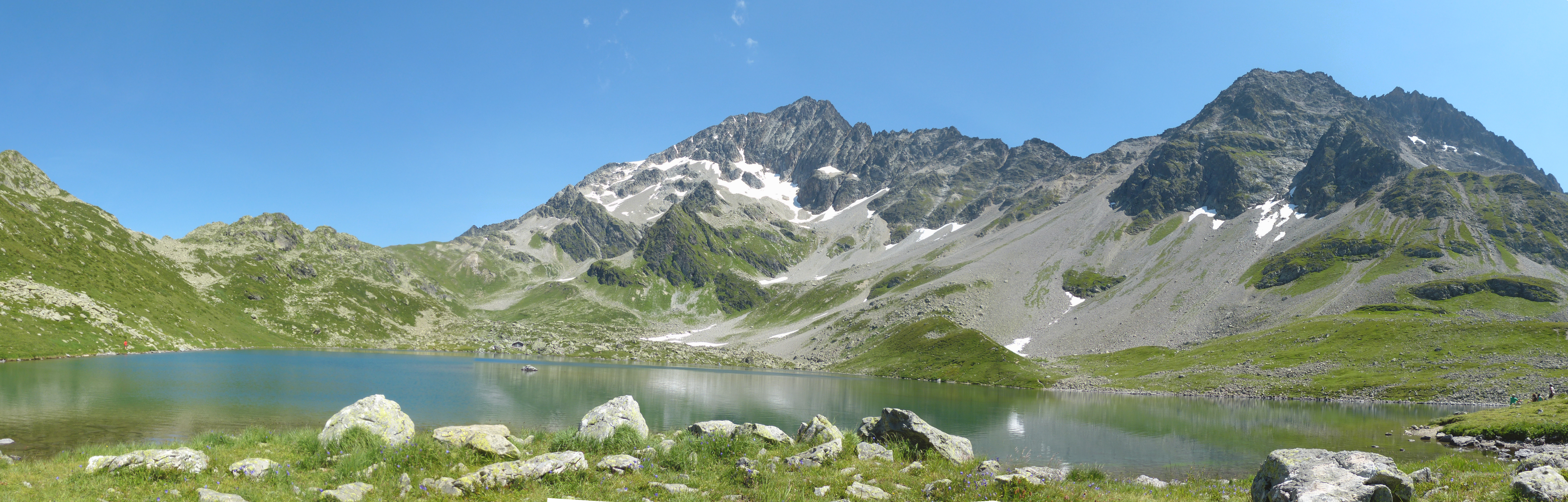 Panorama sur le lac jovet inférieur surplombé par le Mont Tondu dans la réserve naturelle des Contamines-Montjoie